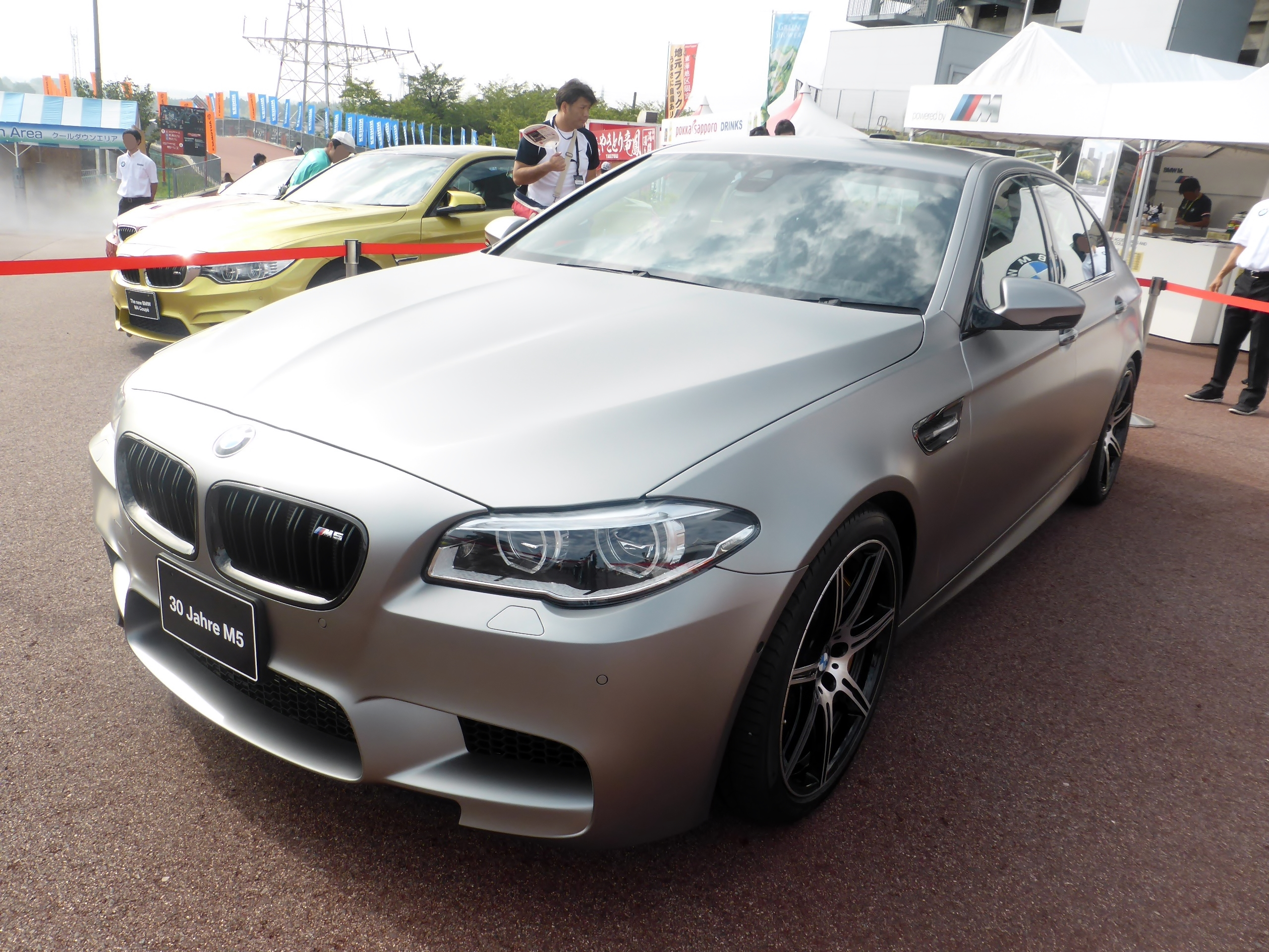 F10型BMW・M5 30周年仕様をフロントから撮影。